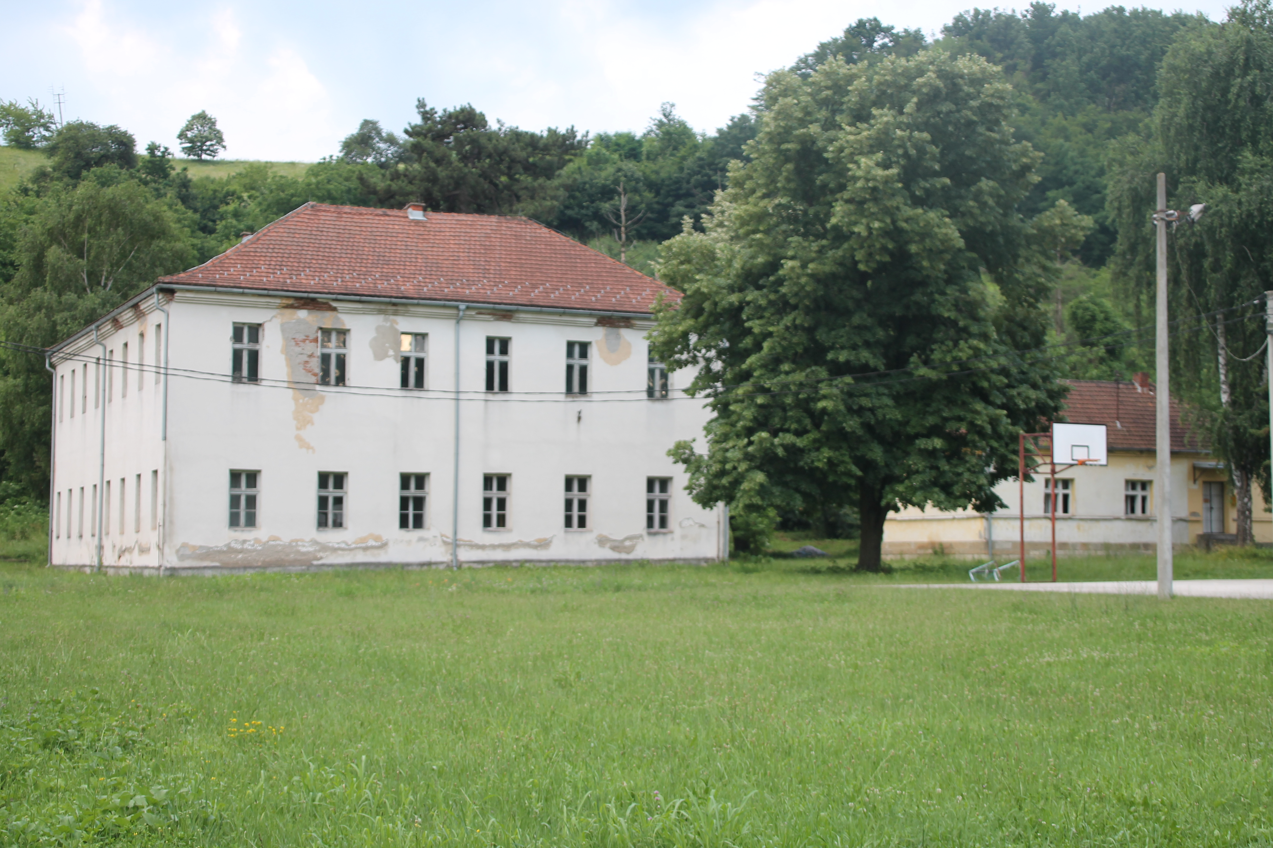 Banjica (Čačak)